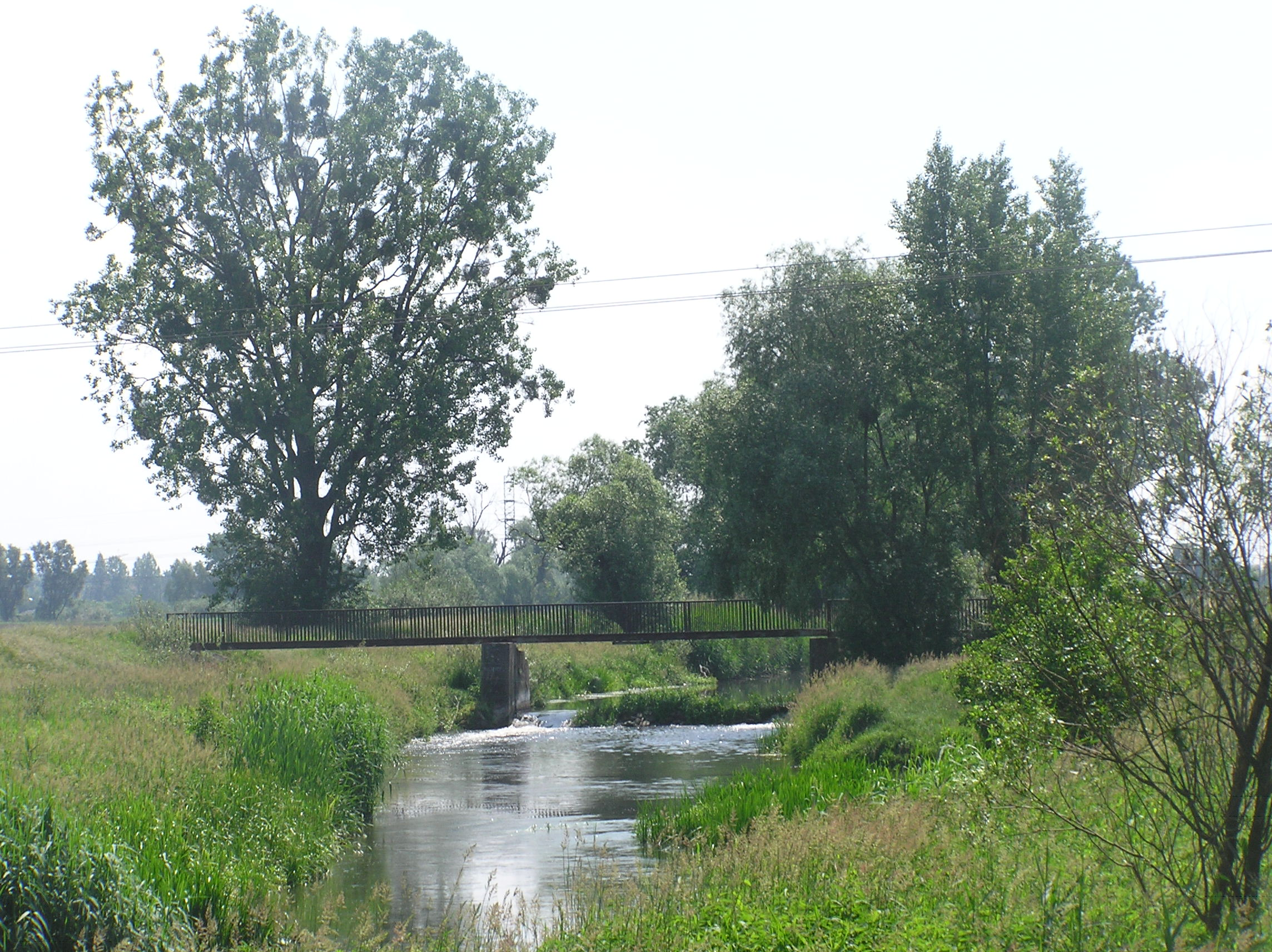 Widawa rzeka (dopływ Odry), kładka nad Widawą Sołtysowice - Kłokoczyce we Wrocławiu.